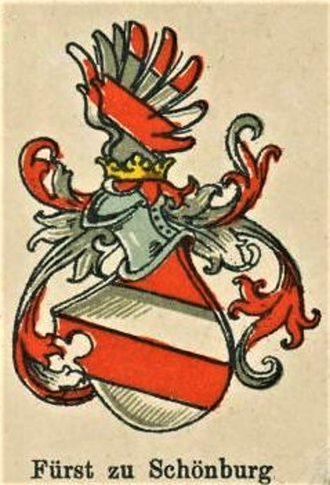 Herb von Schönburg